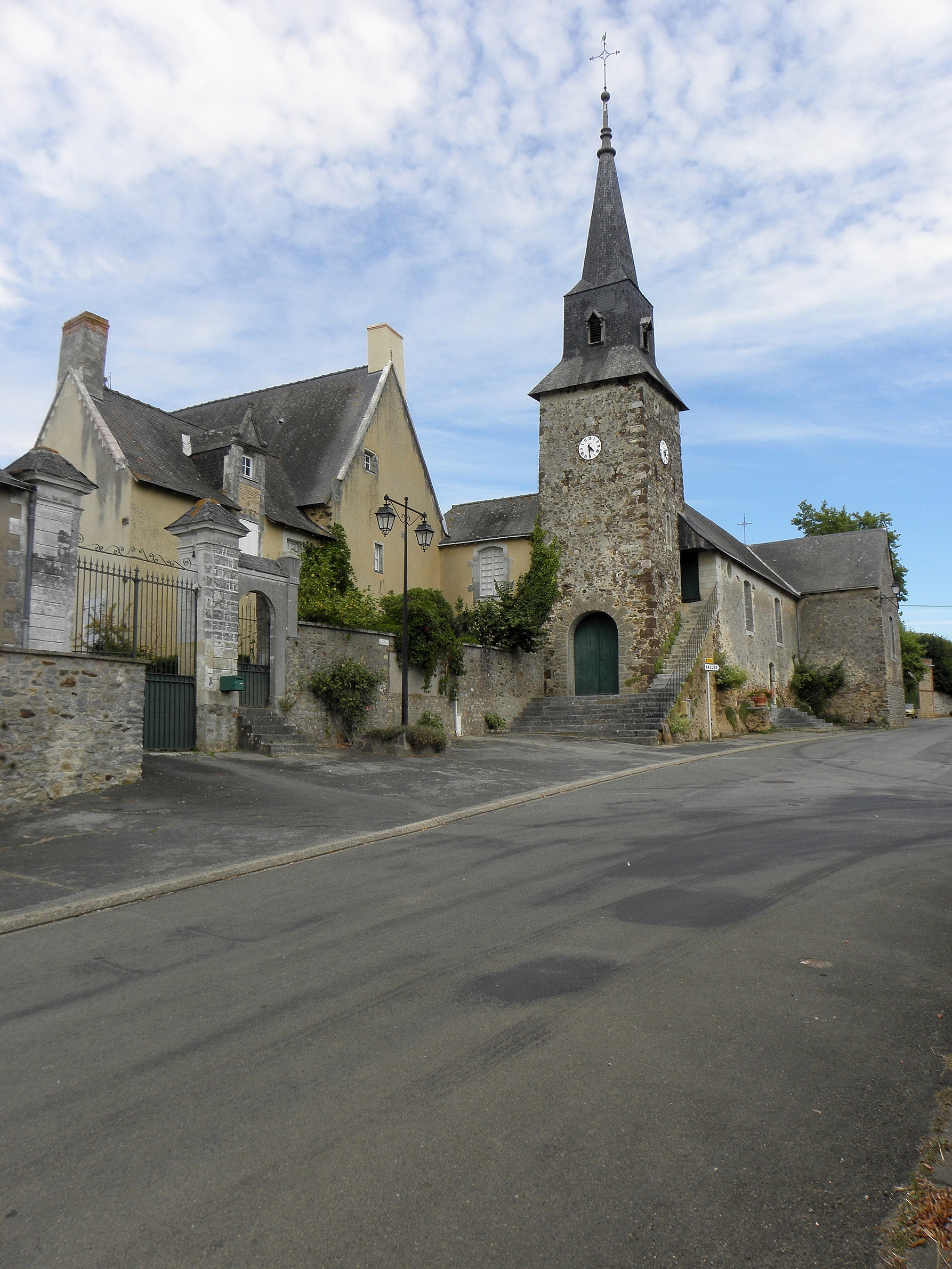 Église de Beaumont-Pied-de-Bœuf (53).